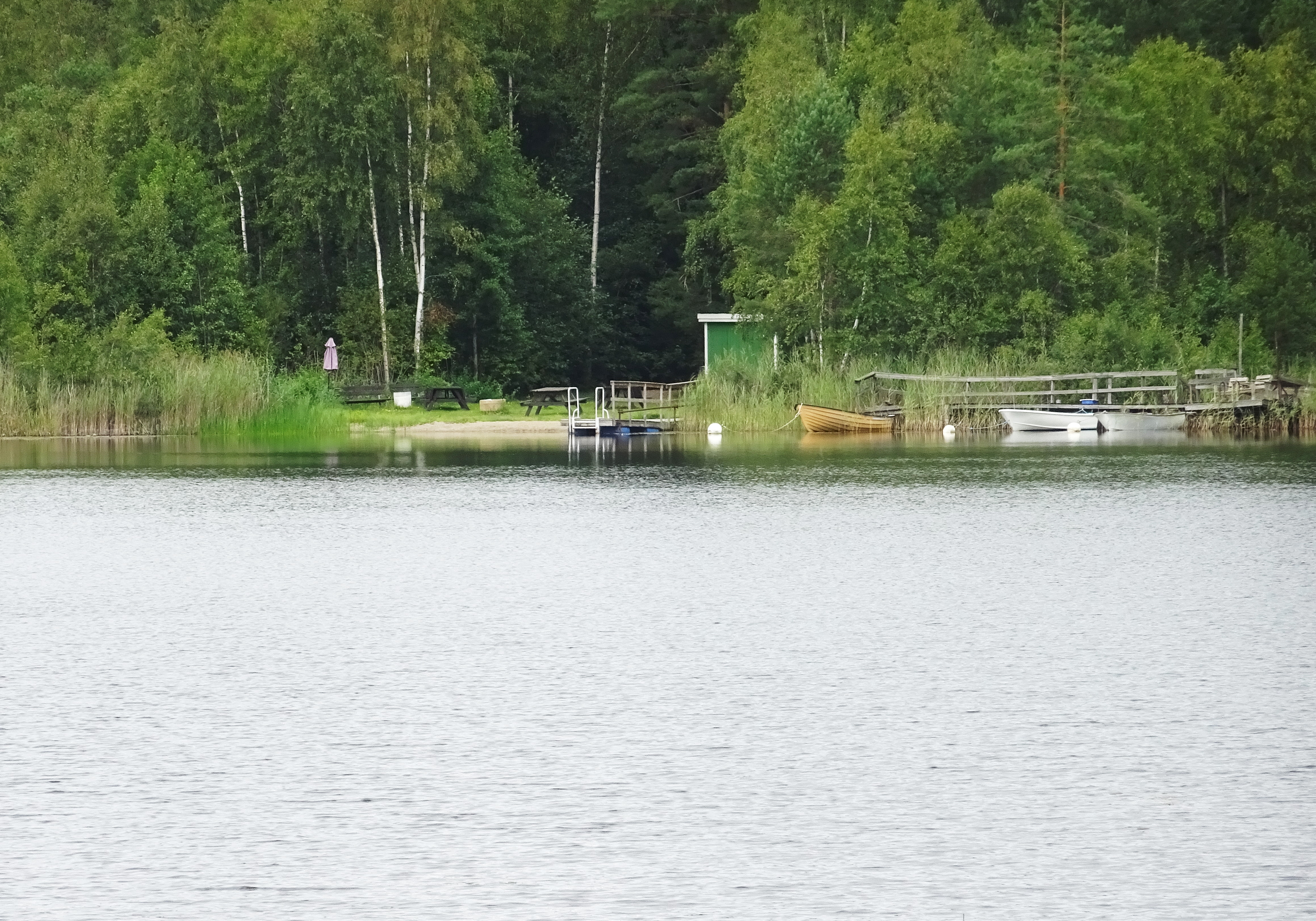 Fågelsjön (Ytterenhörna socken, Södermanland)